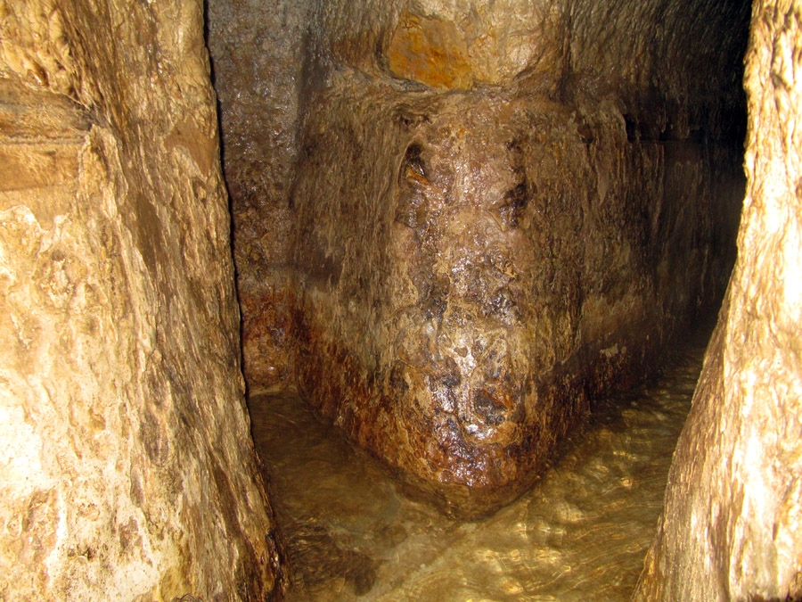 Hezekiah's Tunnel נקבת השילוח